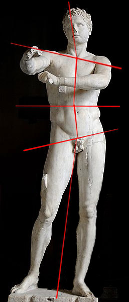 Contrapposto lines at Apoxyomenos Pio-Clementino